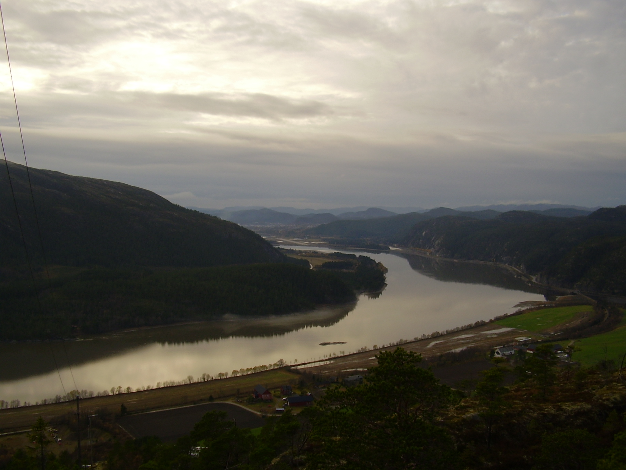 Der Namsen, vom Kvatningenfjell aus gesehen. Im Hintergrund Namsos. Namsen, sett fra Kvatningenfjellet, Namsos i bakgrunnen. Namsen river, seen from the Kvatningenfjell, Namsos in the background.